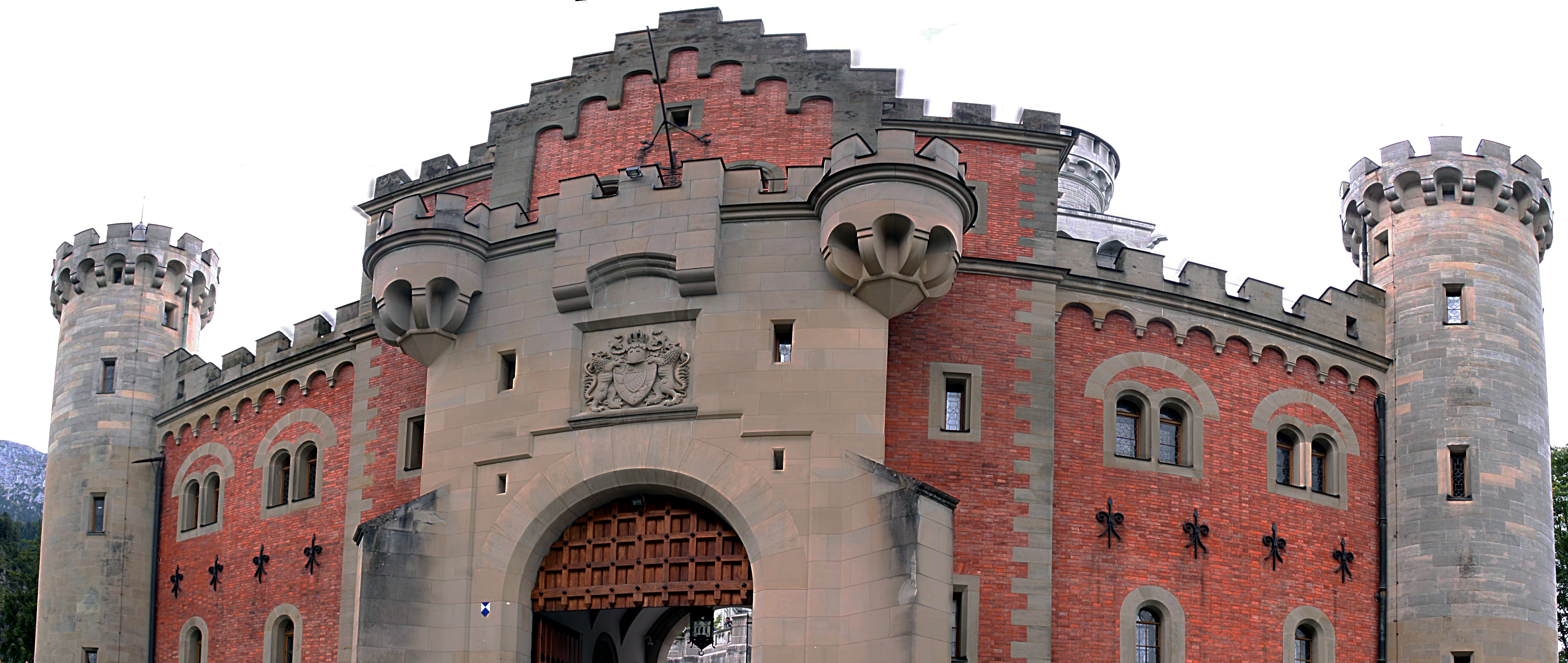 Schloss_Neuschwanstein